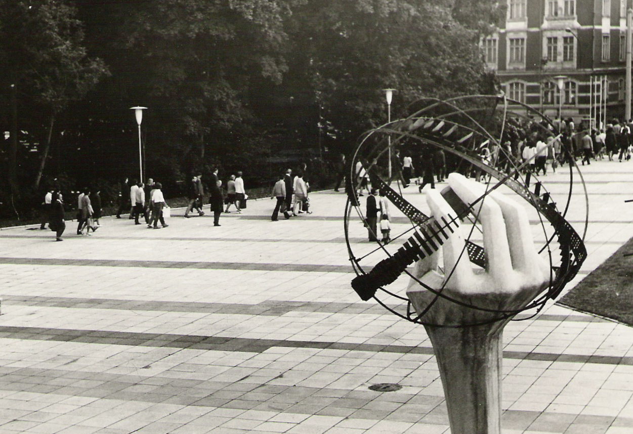 Photo vom Funkwerk in Erfurt. Man sieht die Werktätigen zu Feierabend zur Straßenbahn gehen. Die große Fläche vor dem Werk wurde "Plattensee" genannt.